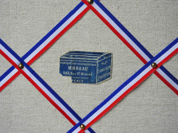 L'étiquette de la malle "Moreau"